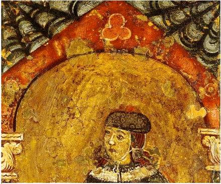 tavoletta di biccherna detail. Dietisalvi di Speme